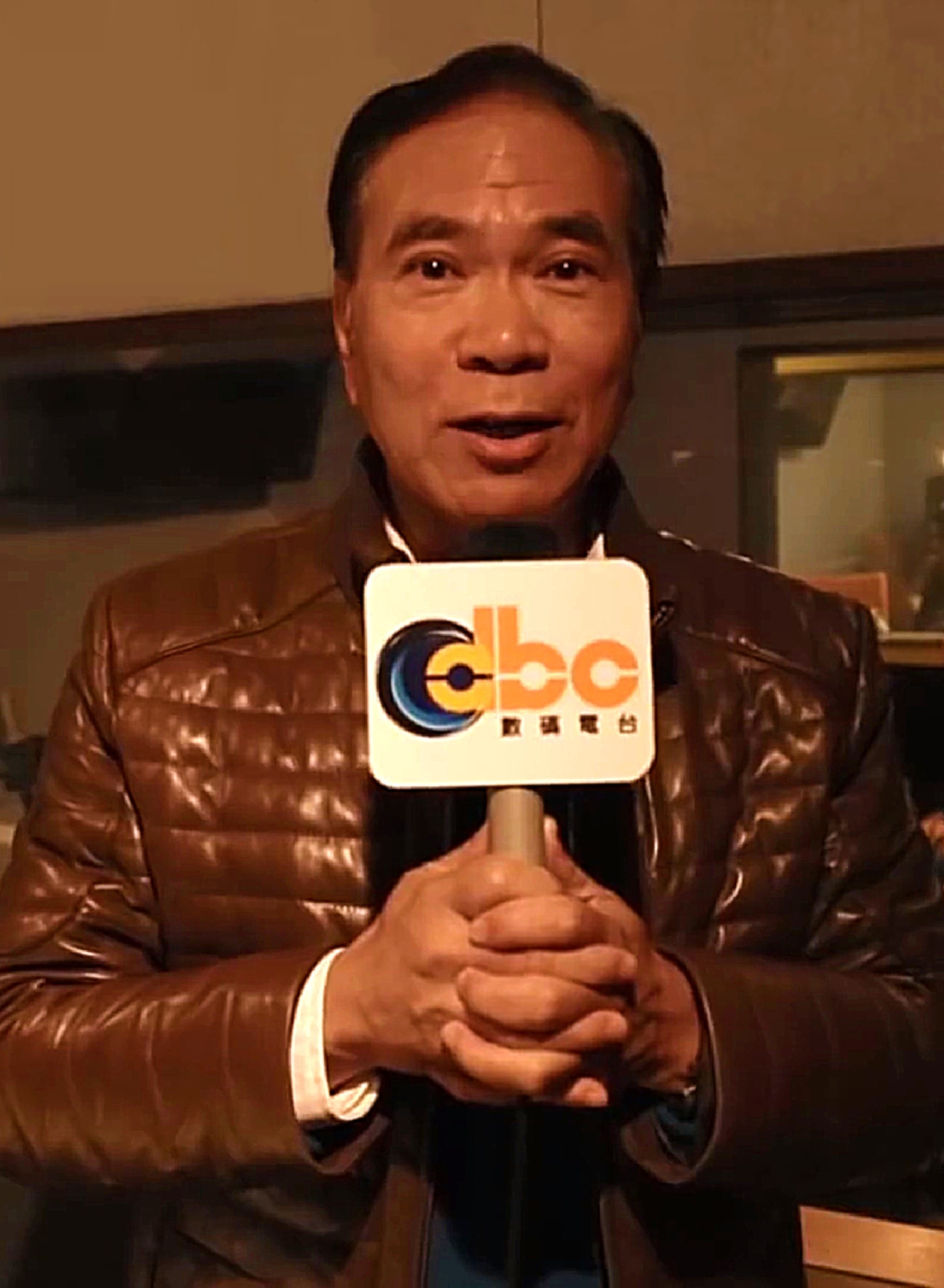 中文（香港）: 1970年代從酒廊出身的男歌手，曾與百代唱片簽約推出唱片，1983至2010年間亦曾為無綫電視和亞洲電視合約藝員